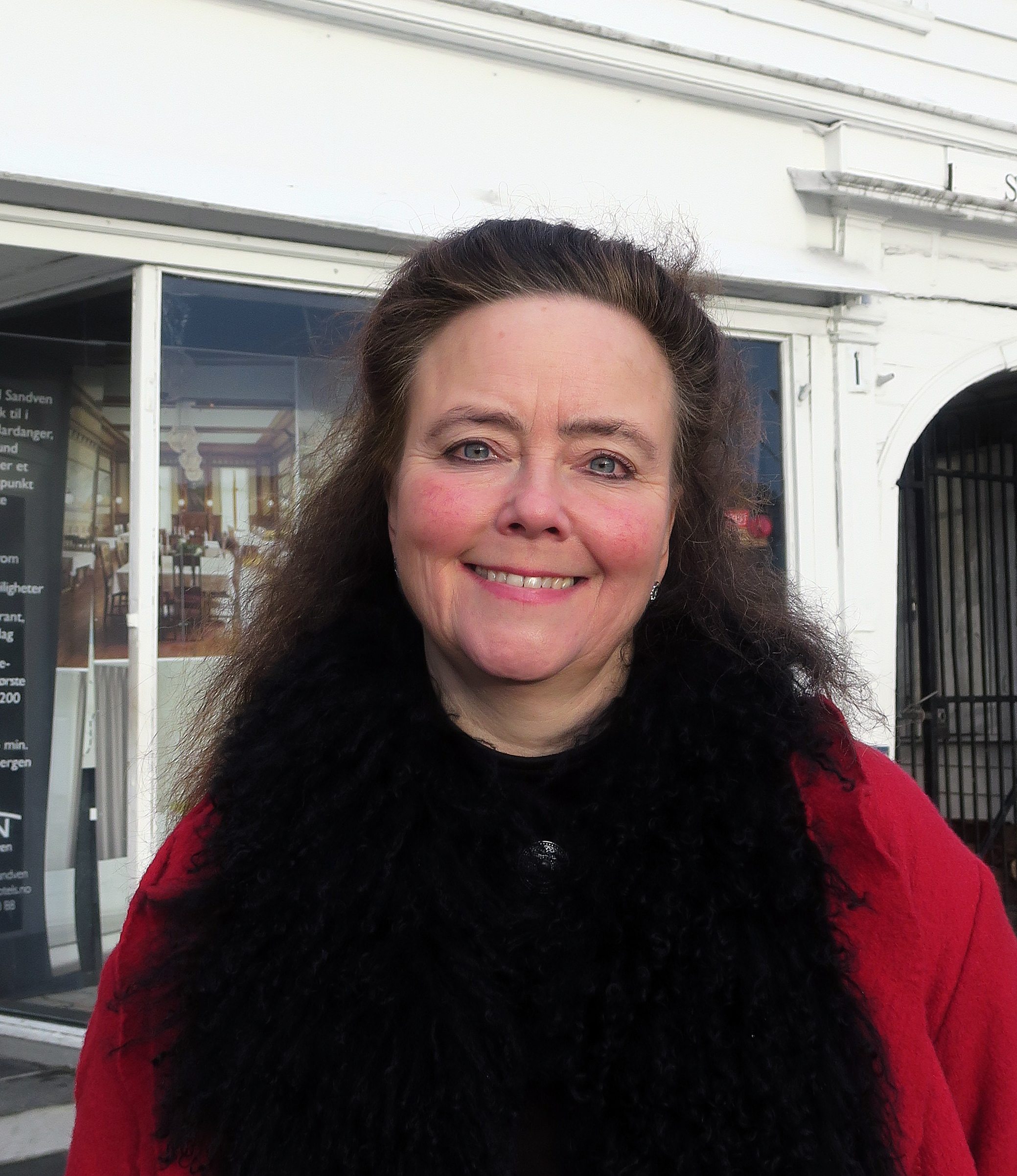 Anna Elisa Tryti